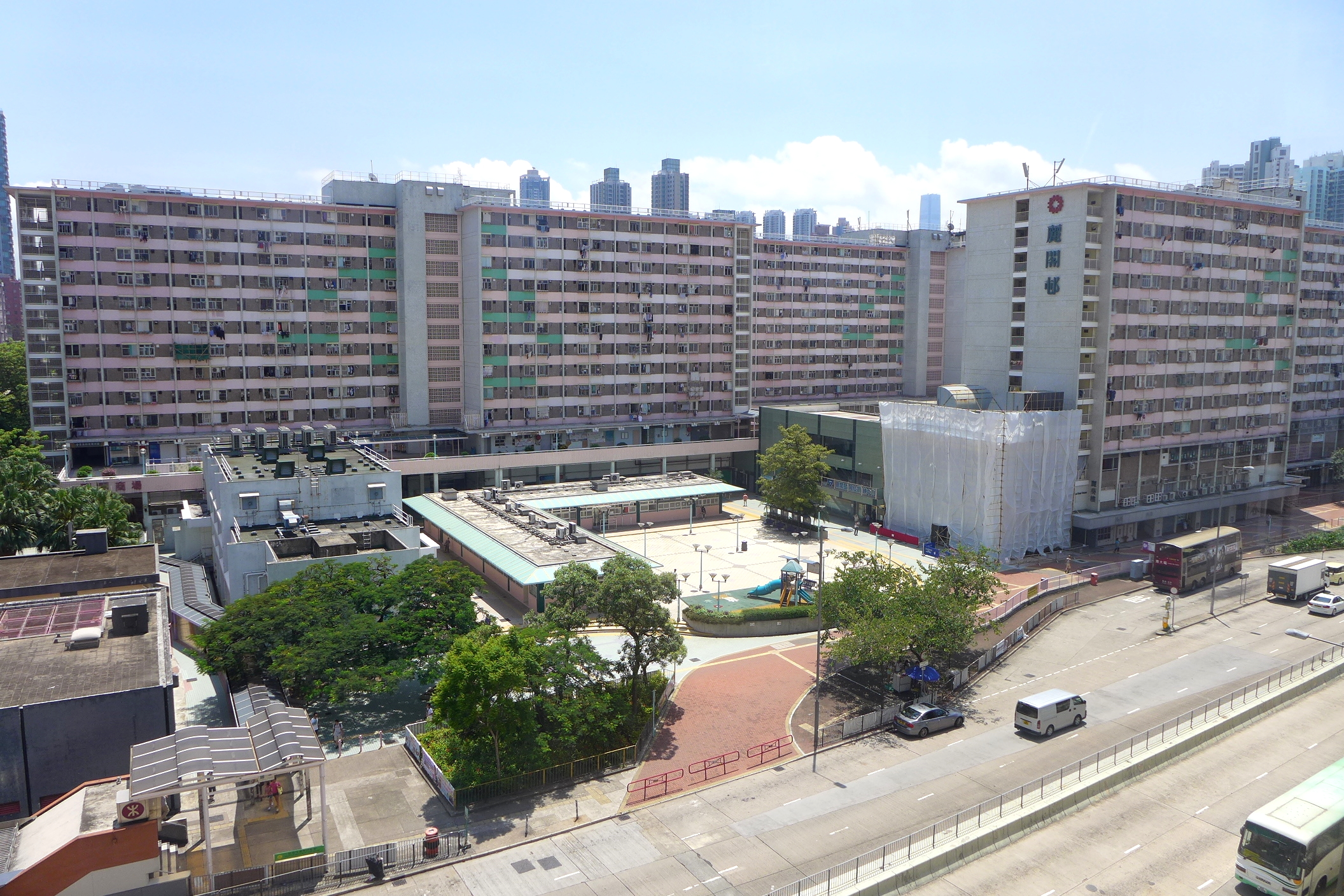 Lai Kok Estate